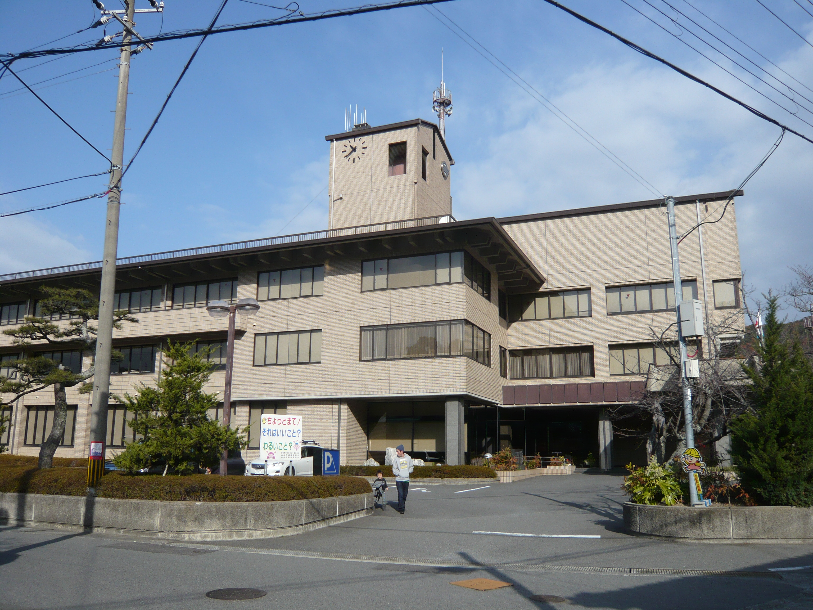 由良町役場